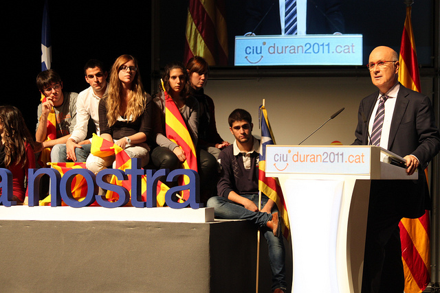 Generals2011 Duran a Manresa